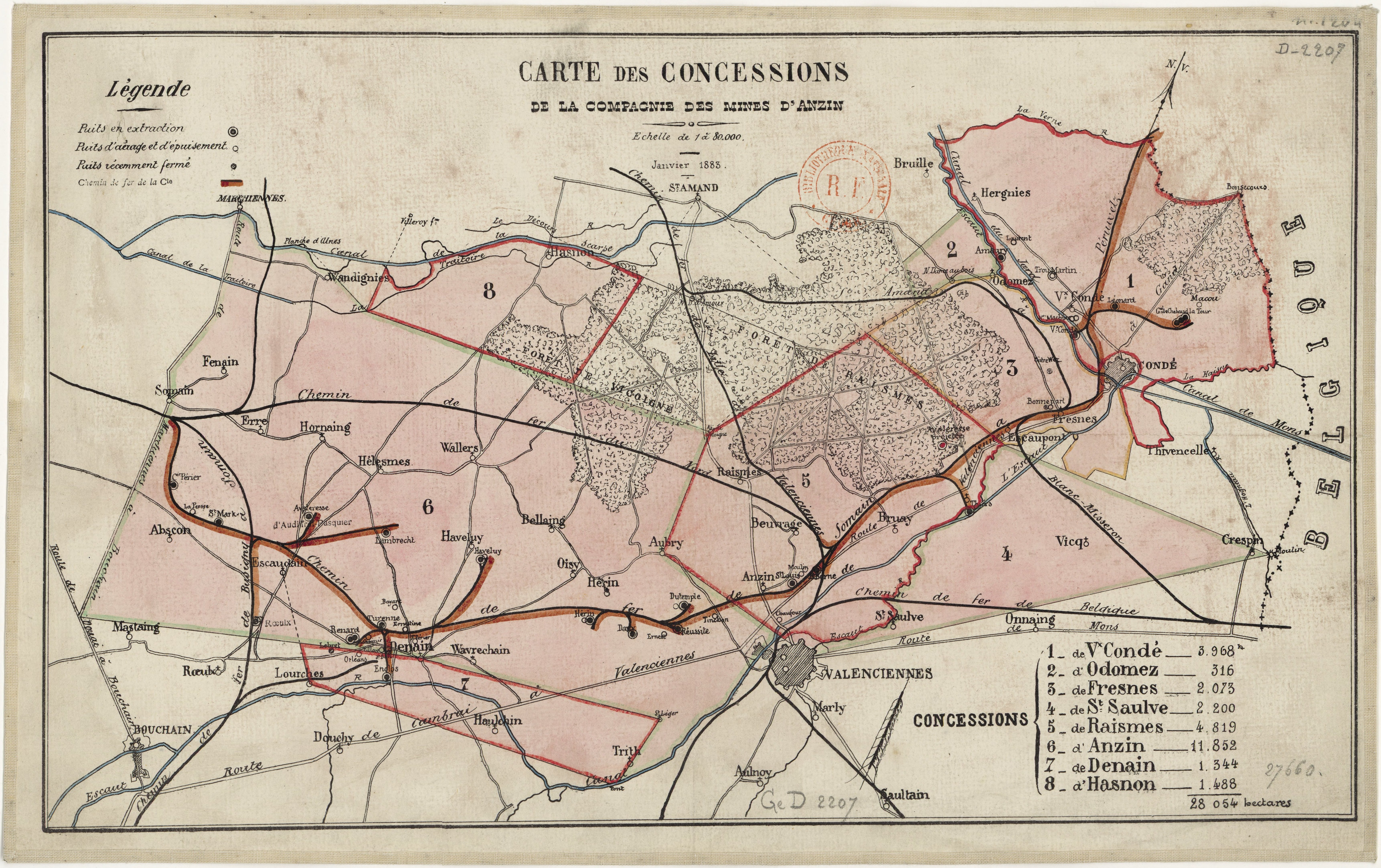 Carte des concessions dépendant de la Compagnie des mines d'Anzin.